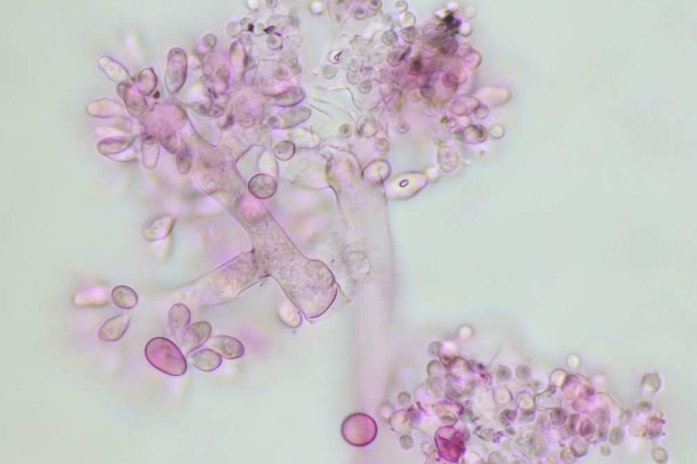 Botrytis galanthina auf Galanthus elwesii, gefärbt